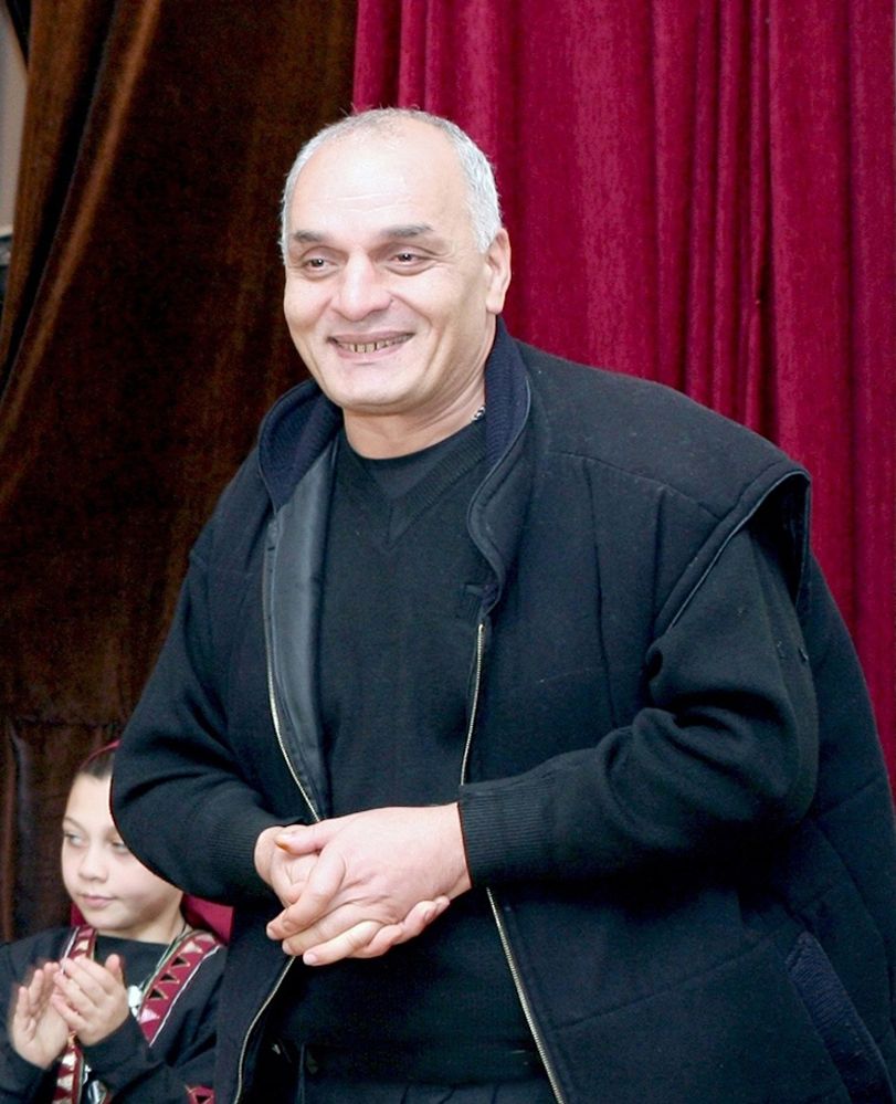 მიხო მოსულიშვილი